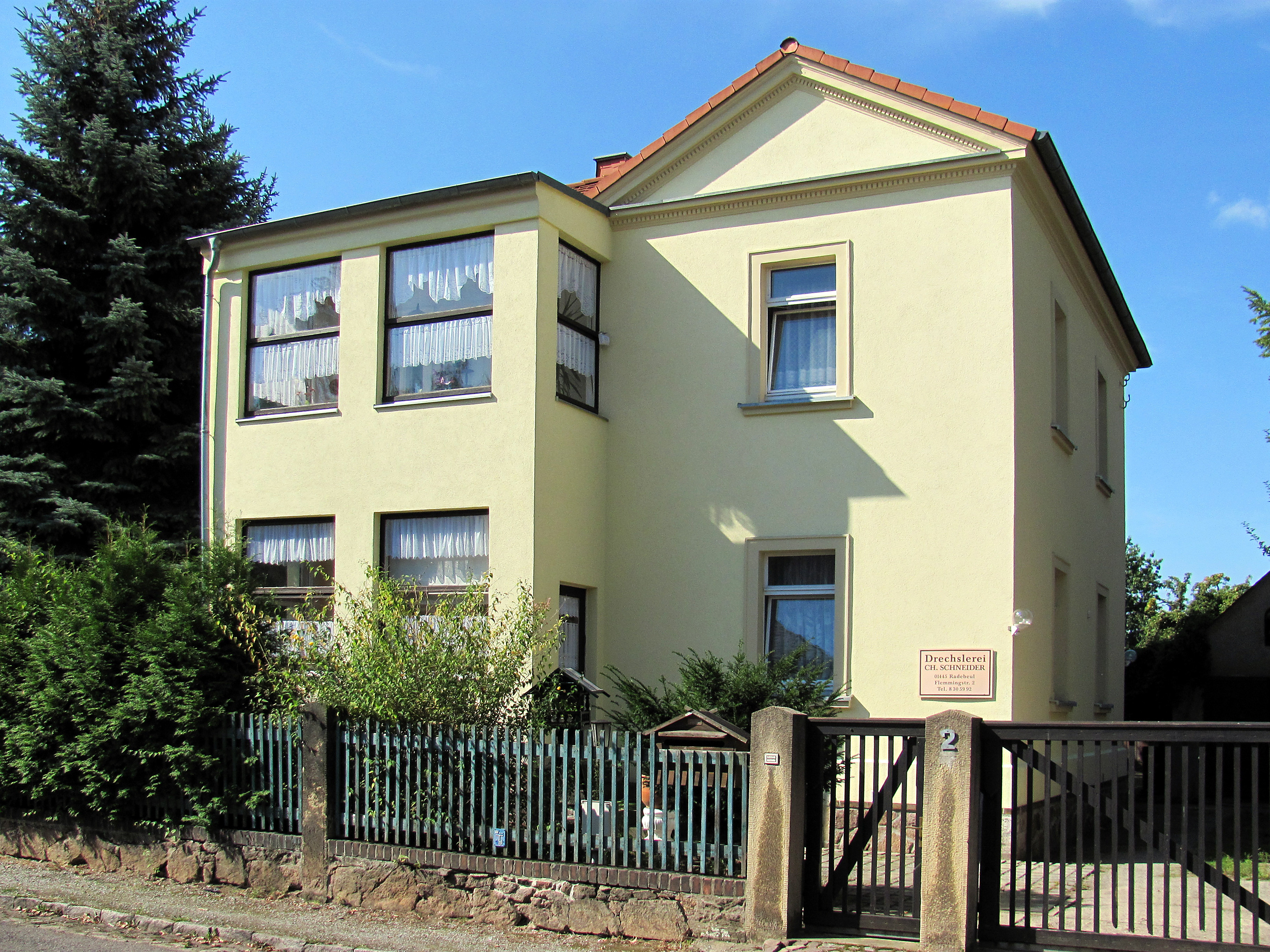 Radebeul, Villa Flemmingstraße 2